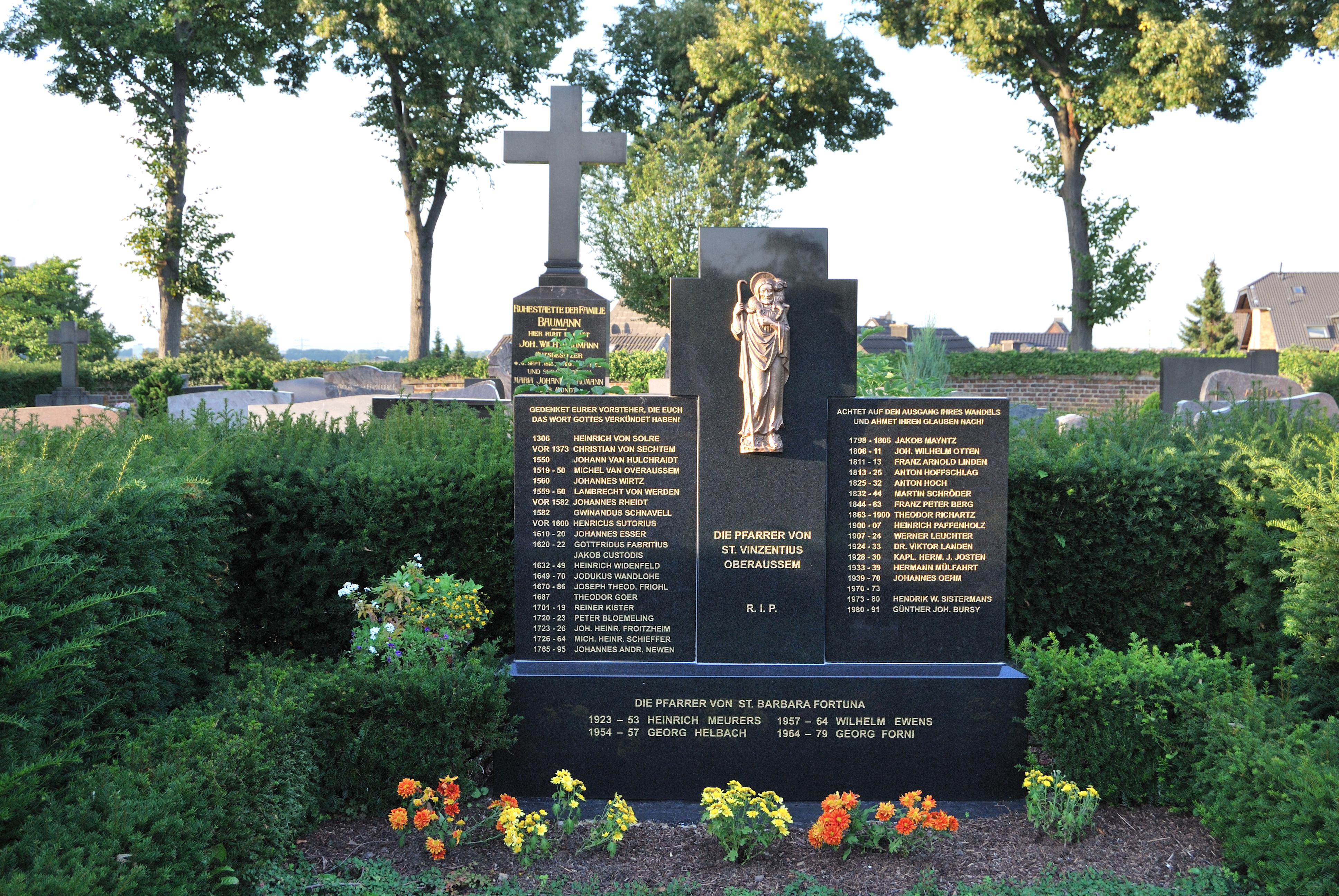 Friedhofstraße, Denkmalnummer 234